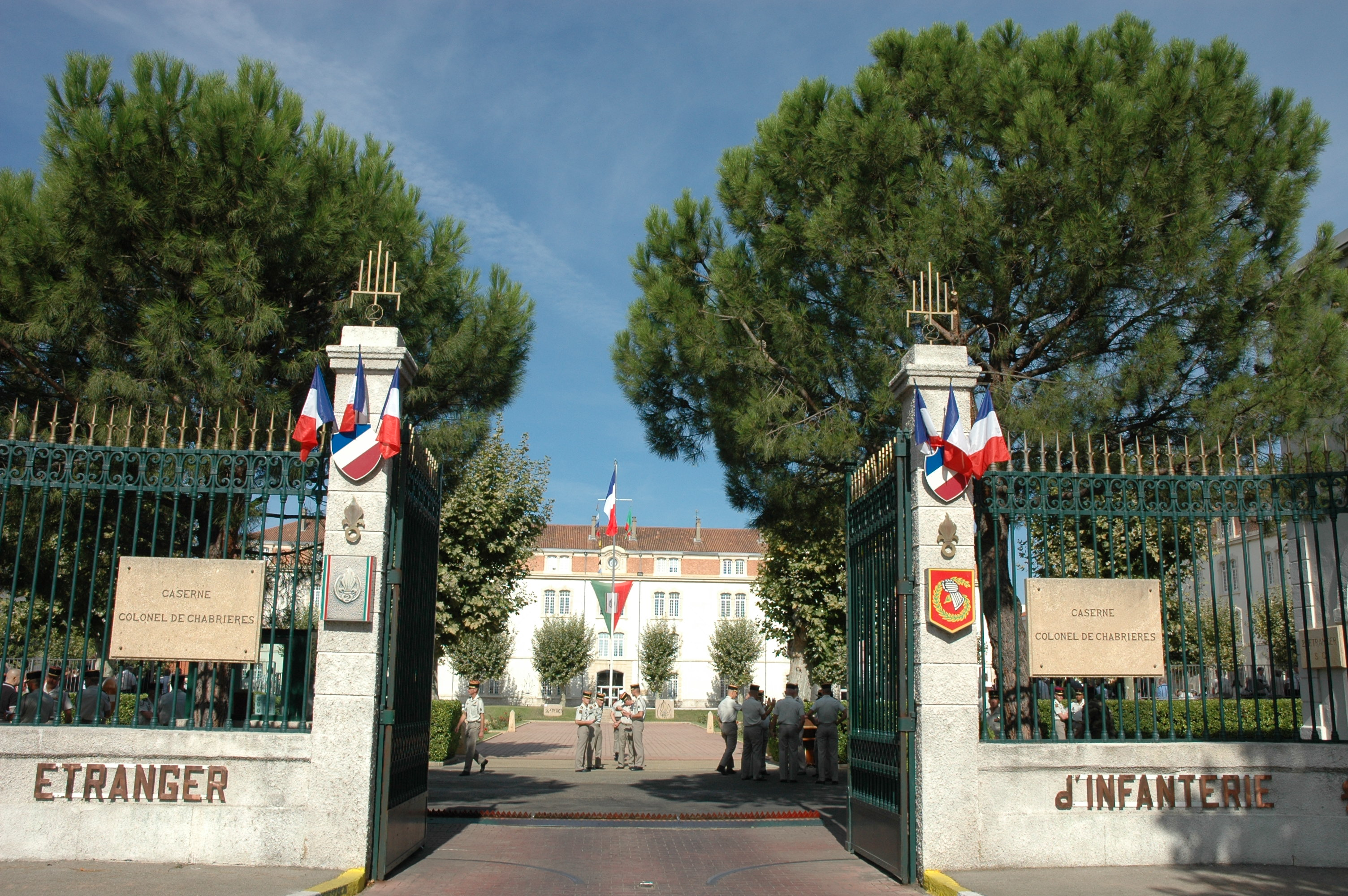 Portail d'entrée du quartier "Colonel de Chabrière", marquant l'entrée du 2e Régiment étranger d'infanterie à Nîmes (France)